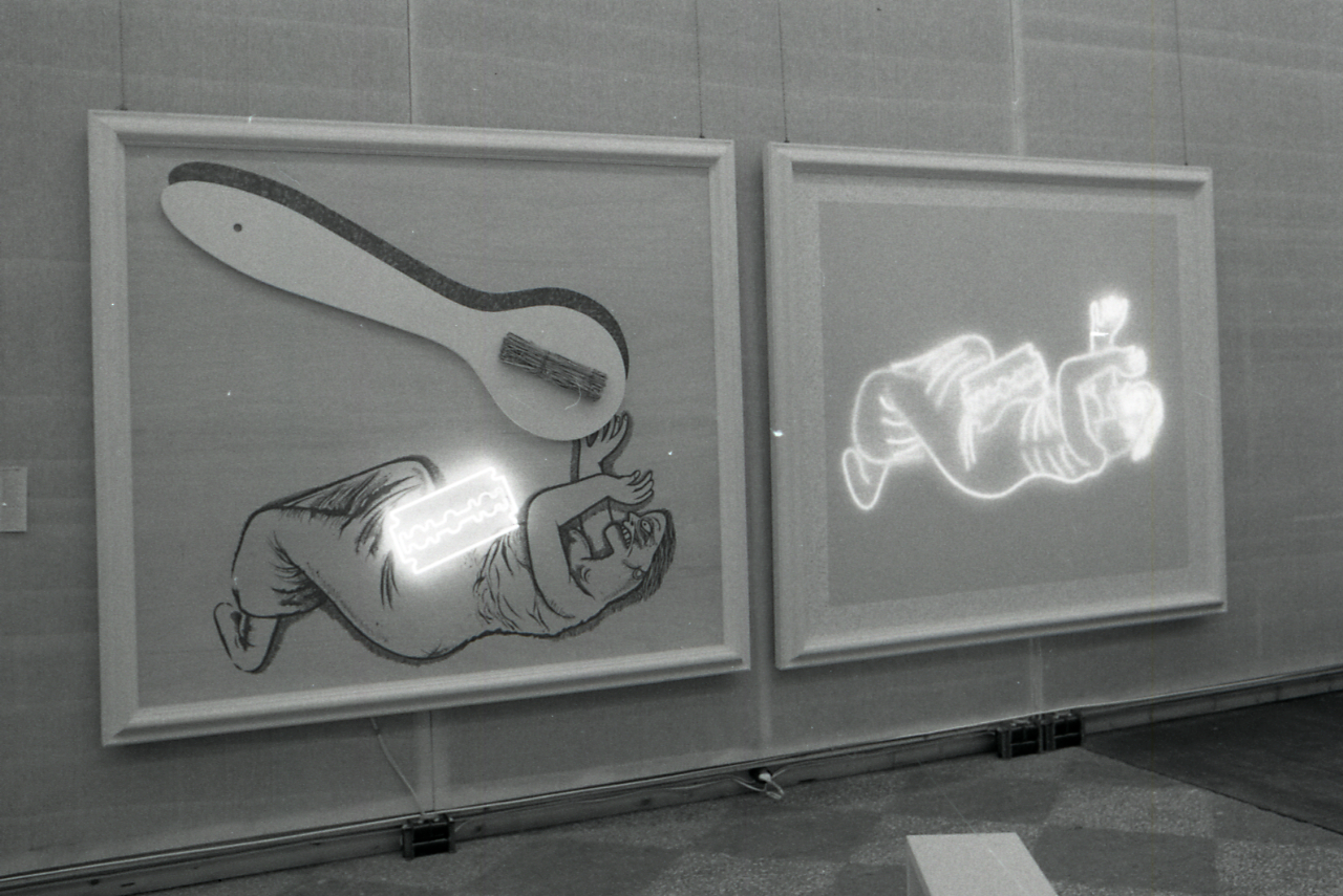 Servizio fotografico : Bologna, 1970 / Paolo Monti. - Strisce: 1, Fotogrammi complessivi: 5 : Negativo b/n, gelatina bromuro d'argento/ pellicola ; 35 mm. - ((I fotogrammi hanno una doppia numerazione. . - Sul portanegativi: Nikon HP4. - Sul dorso del portanegativi Monti specifica: "Biennale Bologna". - Nell'agenda di lavoro citata in nota Monti specifica: "Pozzati Concetto complesso "Grosz mostra Giovane" pittura. Mentre nella fattura, sempre citata in fonti indica: "3 riprese fotografiche Linhoff opere Concetto Pozzati Mostra Biennale". - Occasione: Documentazione di alcune opere dello dell'artista Concetto Pozzati in occasione della biennale internazione della giovane pittura. - Fonte: Fattura di Paolo Monti: IV. Commesse/ Fattura (1970/03/13), presso Archivio Paolo Monti. - Fonte: Agenda di Paolo Monti: Monti/ 3 aprile 1966 - 9 marzo 1971/ 12421-16823 (1966-1971), presso Archivio Paolo Monti